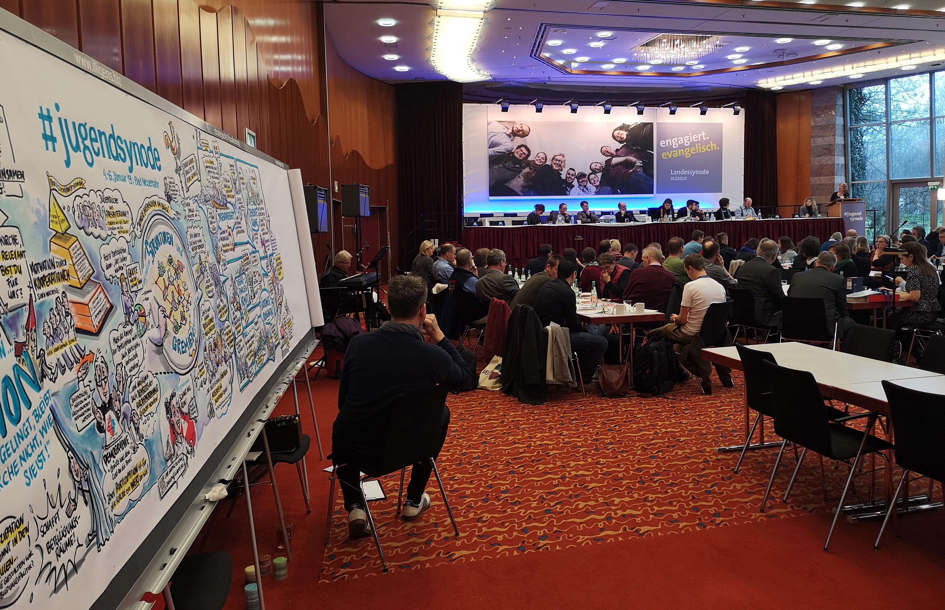 Jugendsynode der Evangelischen Kirche im Rheinland im Dorint Parkhotel Bad Neuenahr